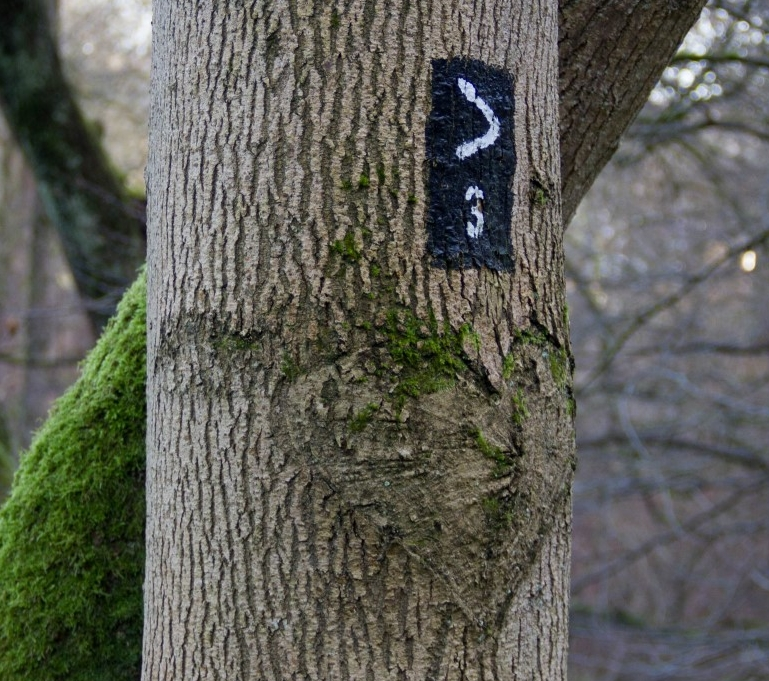 Markierung des Wanderweges Winkel drei des Kölner Eifelvereins